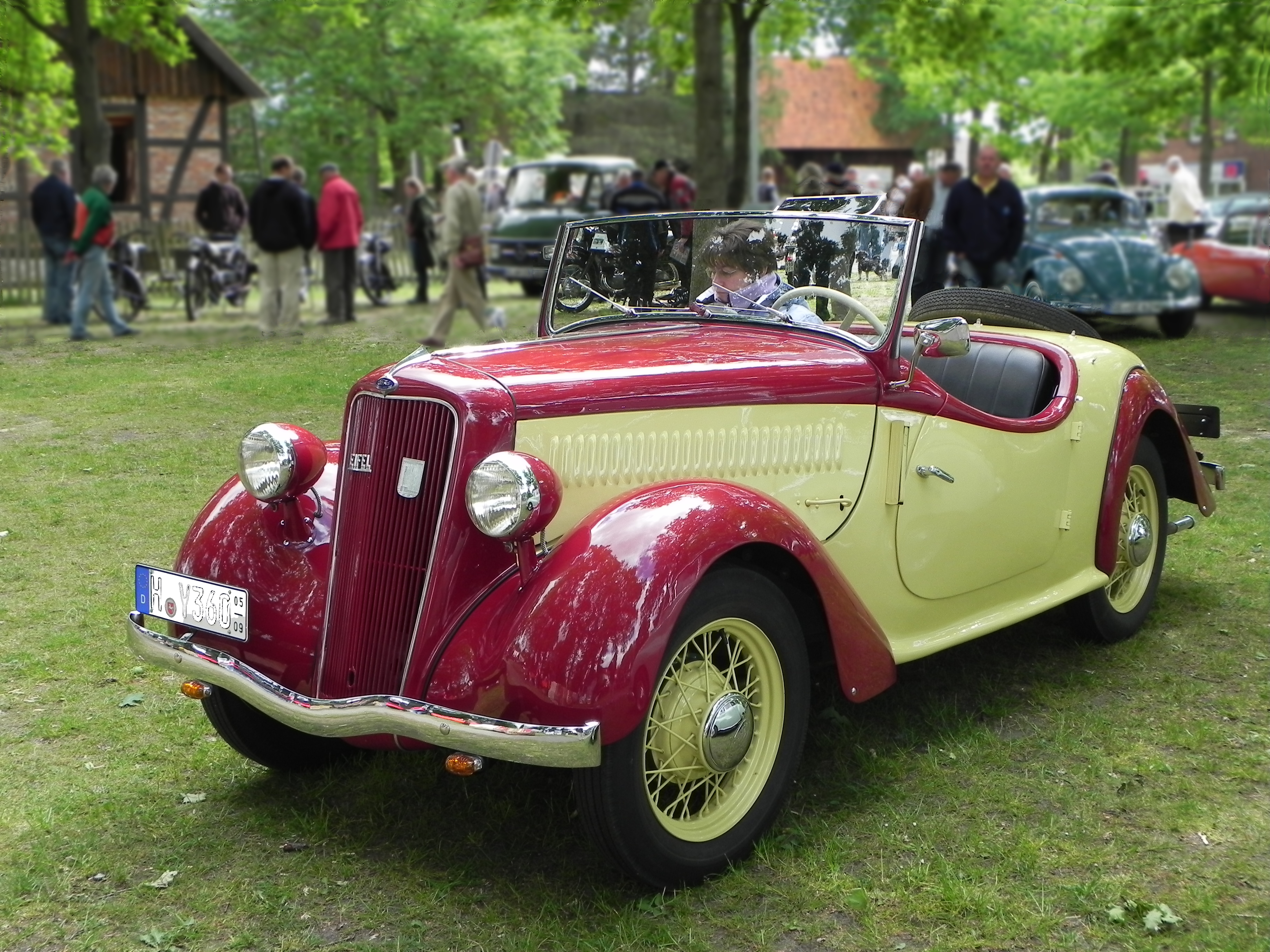 Ford Eifel Roadster (Baujahr 1936) mit offenem Verdeck